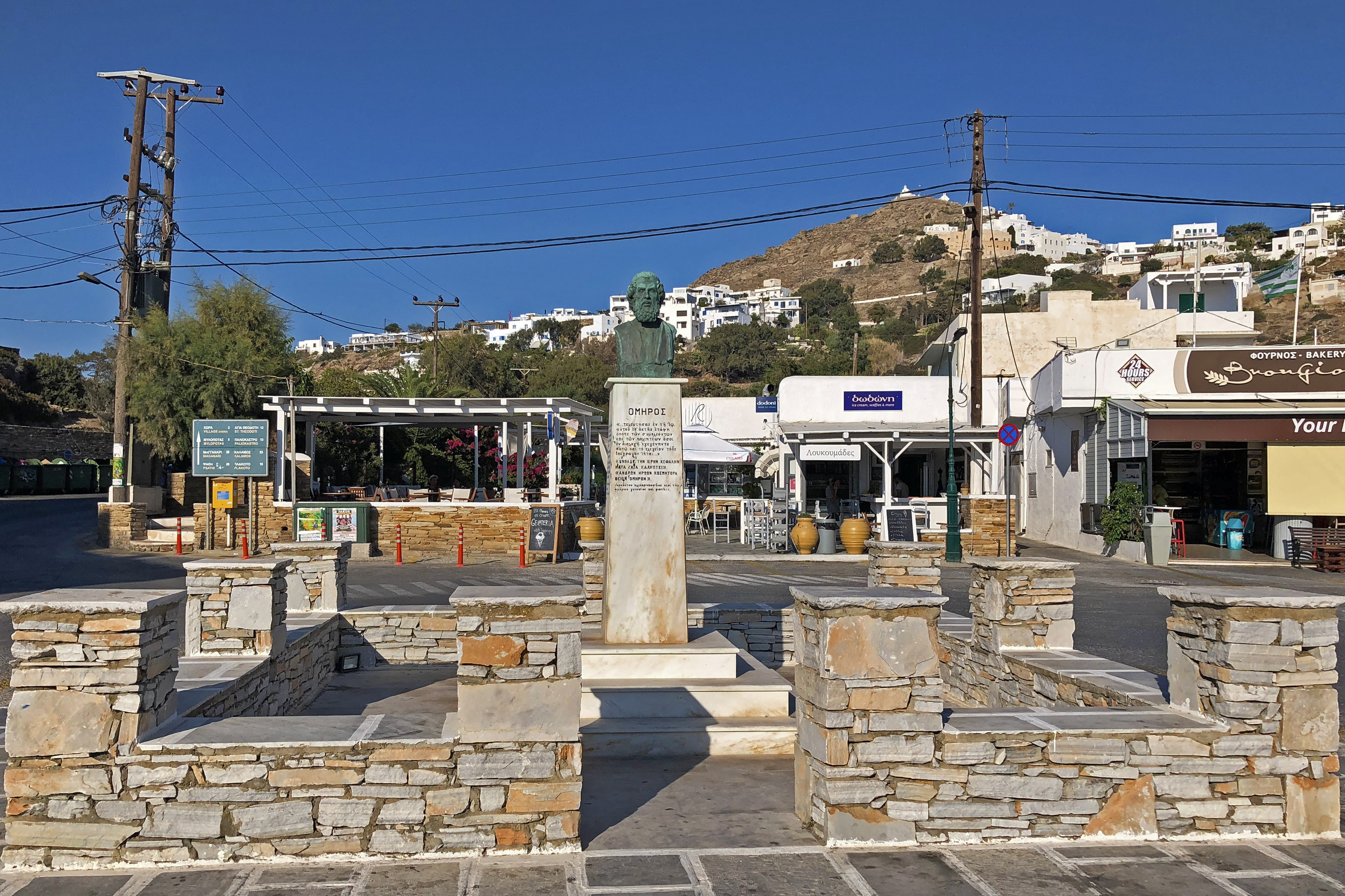 Busto di Omero al porto di Ios, Grecia, agosto 2018